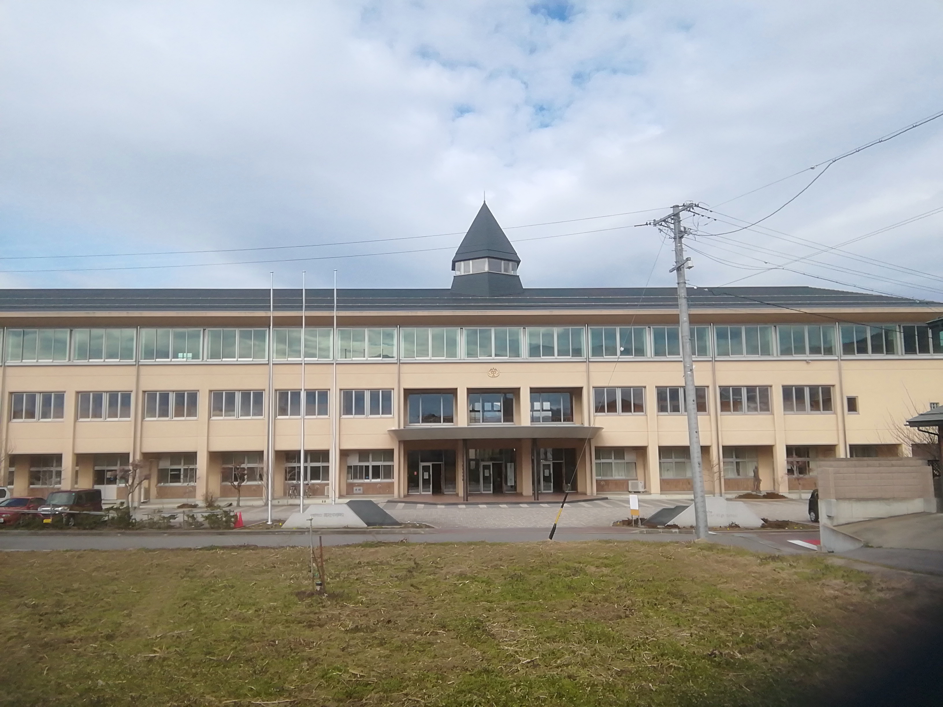 高社中学校（2020-3-27）